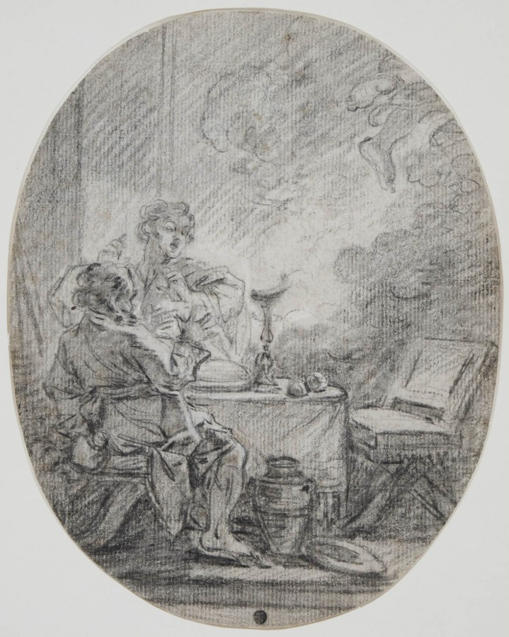 Pierre noire, estompe, craie blanche. Papier vergé. 24.1 cm x 19.3 cm Collection privée